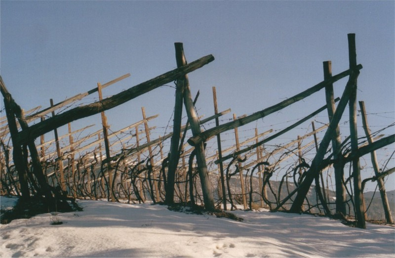 Autore: Ettore Dal Farra; descr: pergola trentina; licenza: pubblico dominio